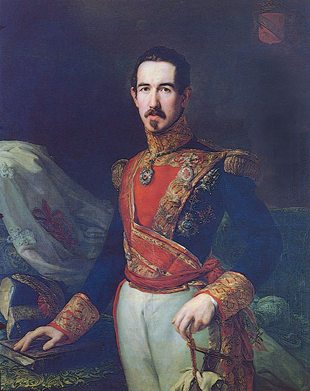 Retrato de Juan de la Pezuela, conde de Cheste.